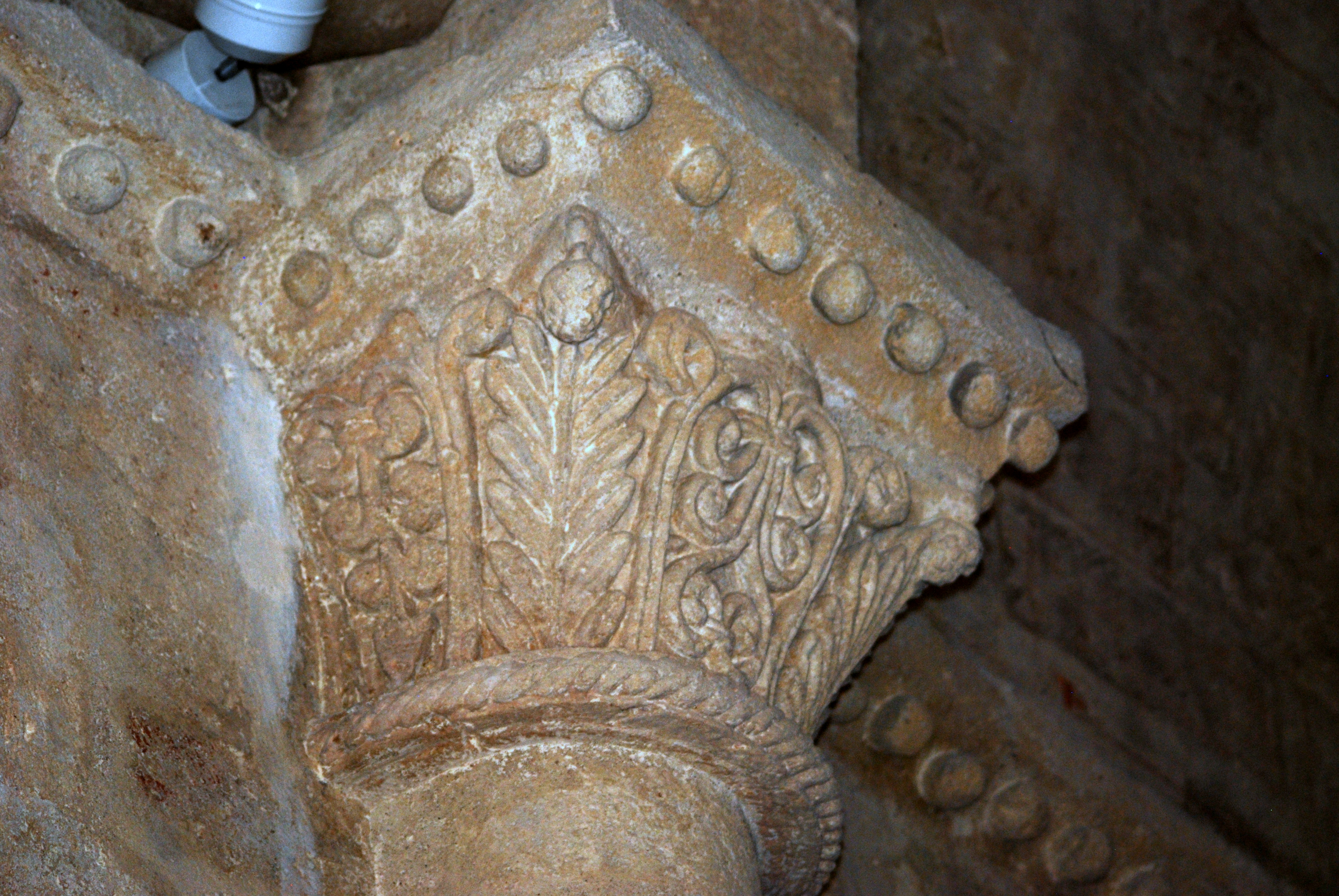 Lignan église Ste Eulalie